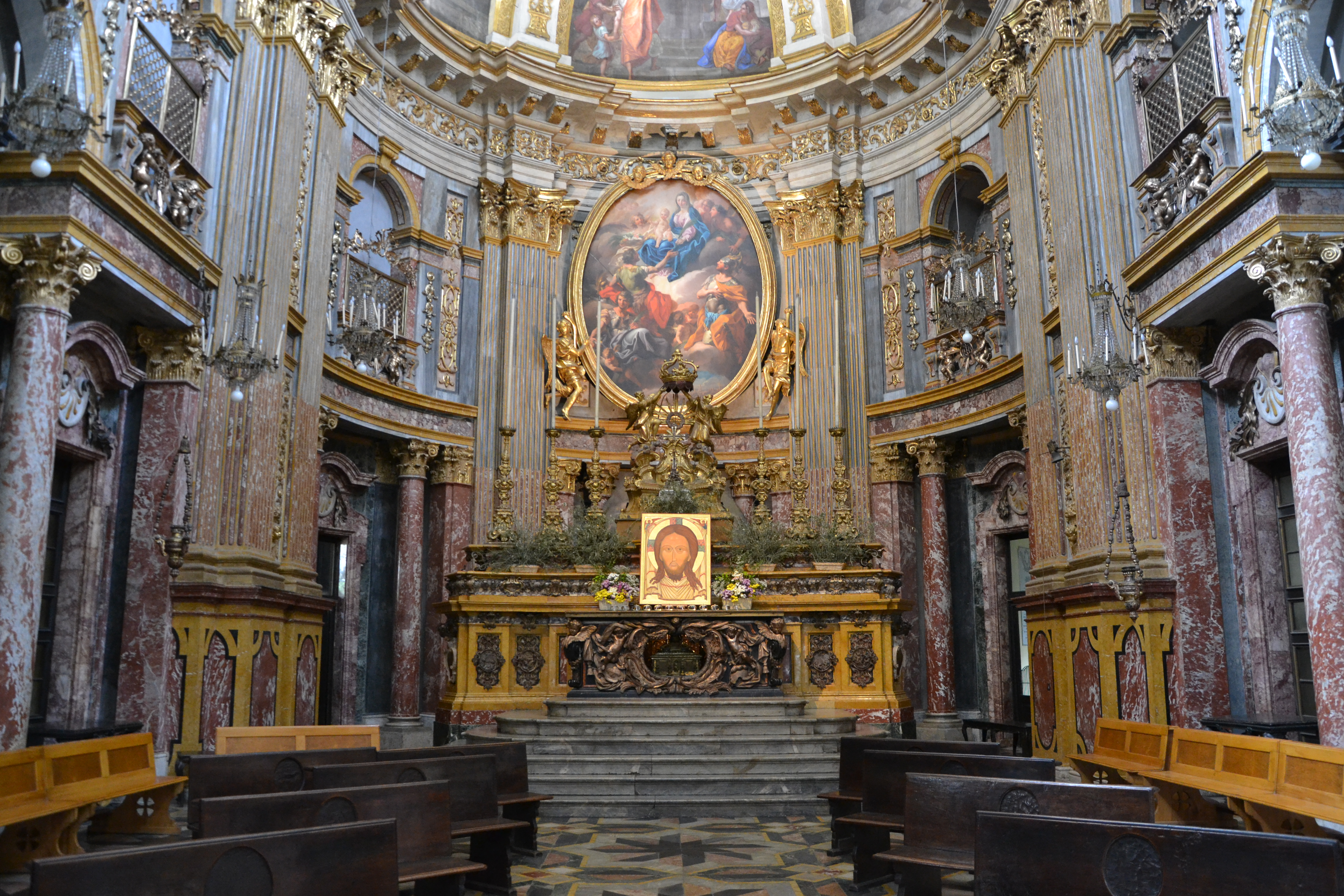 Chiesa dei Santi Martiri Avventore, Ottavio e Solutore (Torino), altare maggiore progettato dal primo architetto di corte, Filippo Juvarra (1678-1736) nel 1730 contenente la preziosa urna in bronzo dorato con le reliquie dei Santi Martiri